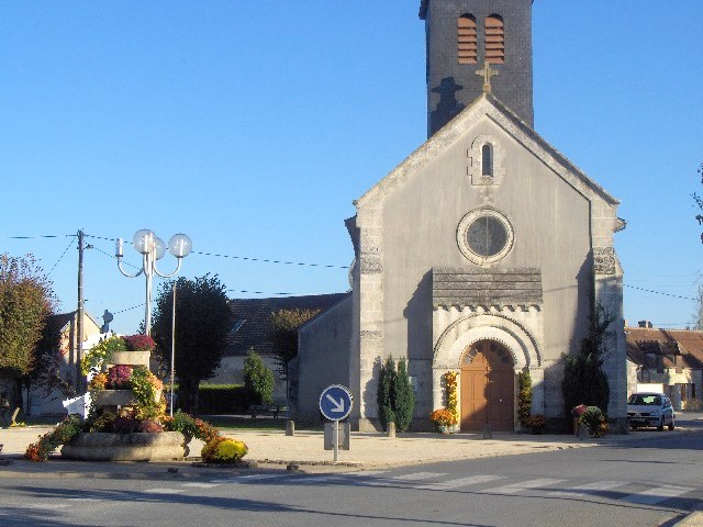 Eglise Trouy